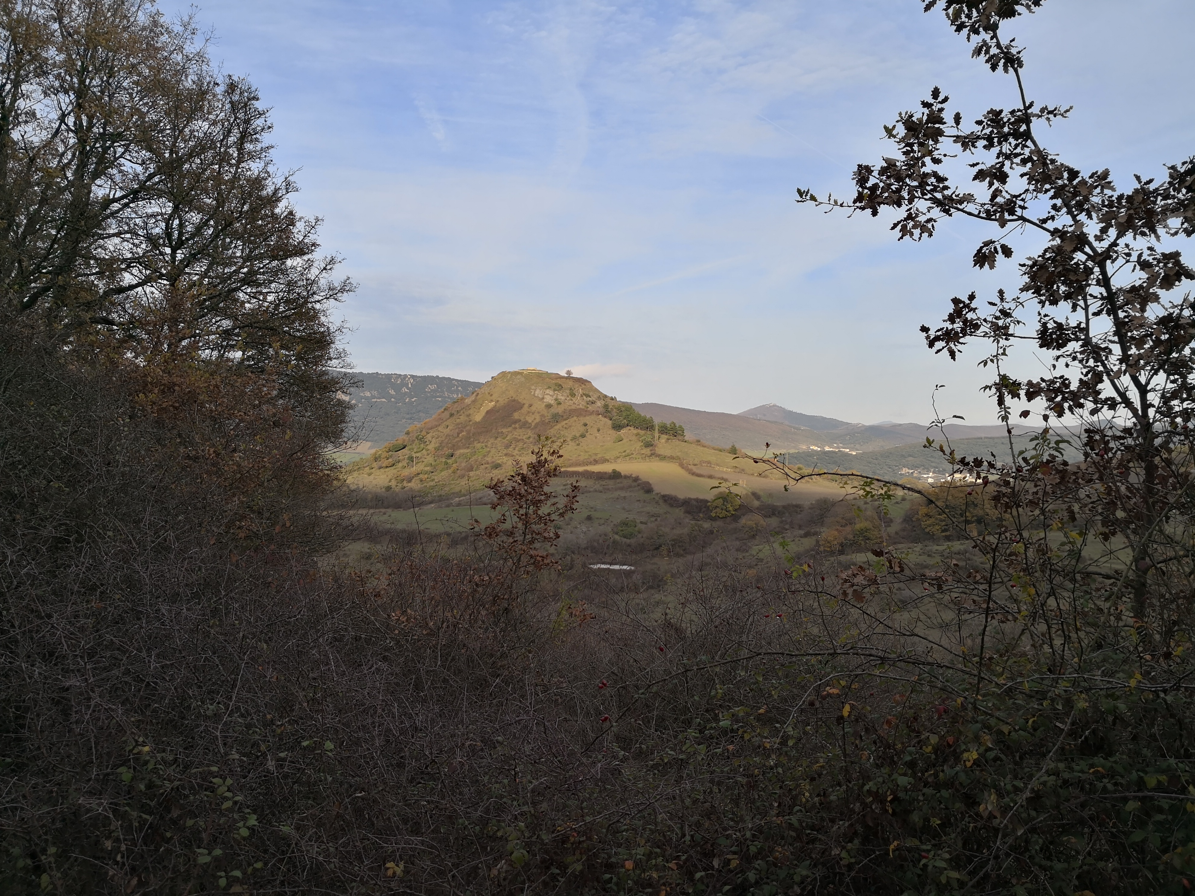 Garaño gaztelua